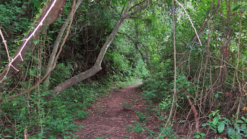 Sendero dentro del Parque Nacional Calilegua